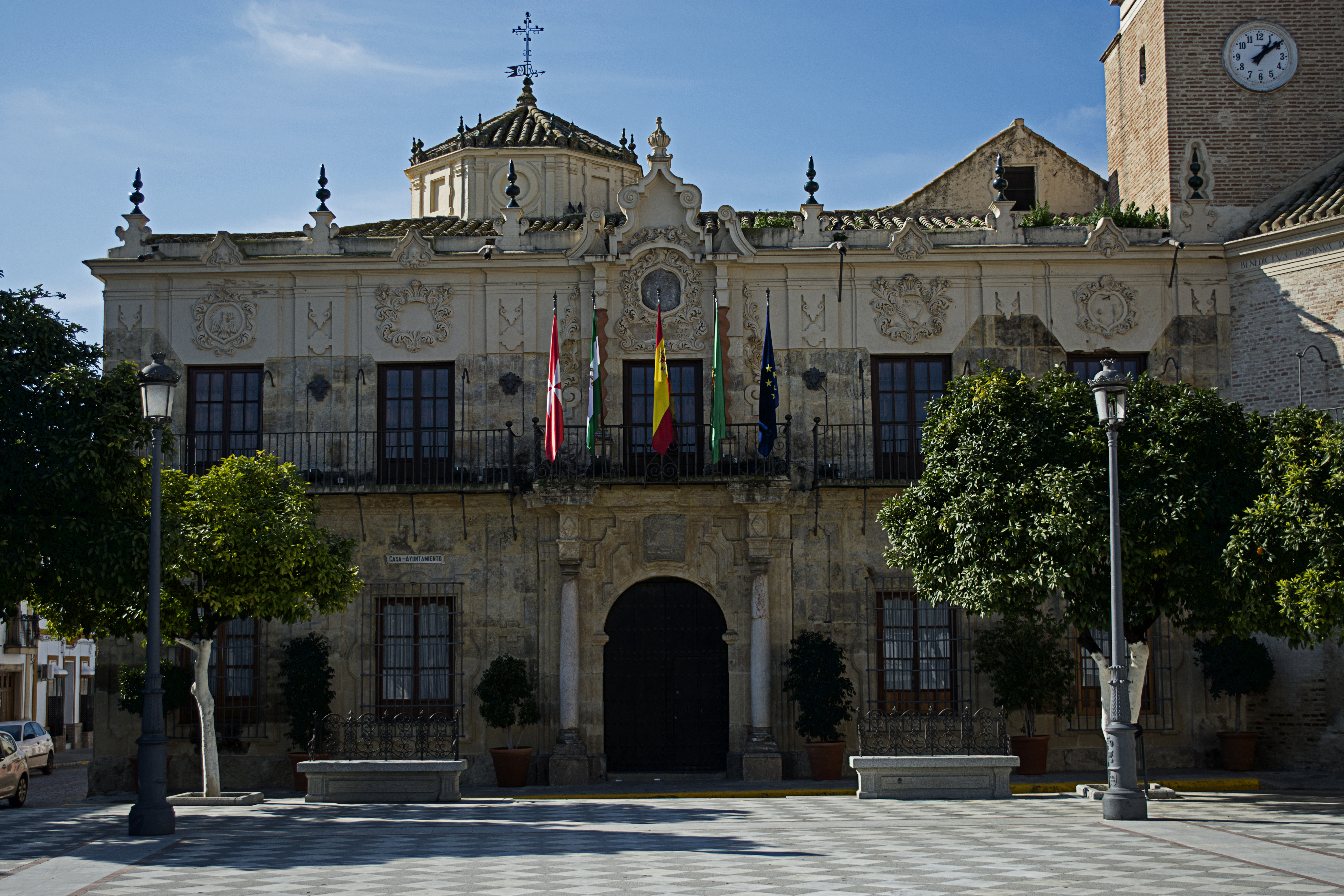 Edificio del ayuntamiento (Casas Capitulares) de Lora del Río